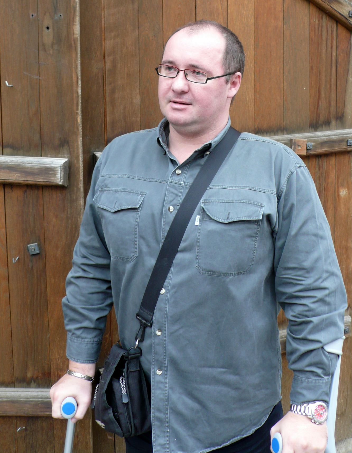 poslanec Jaroslav Eček